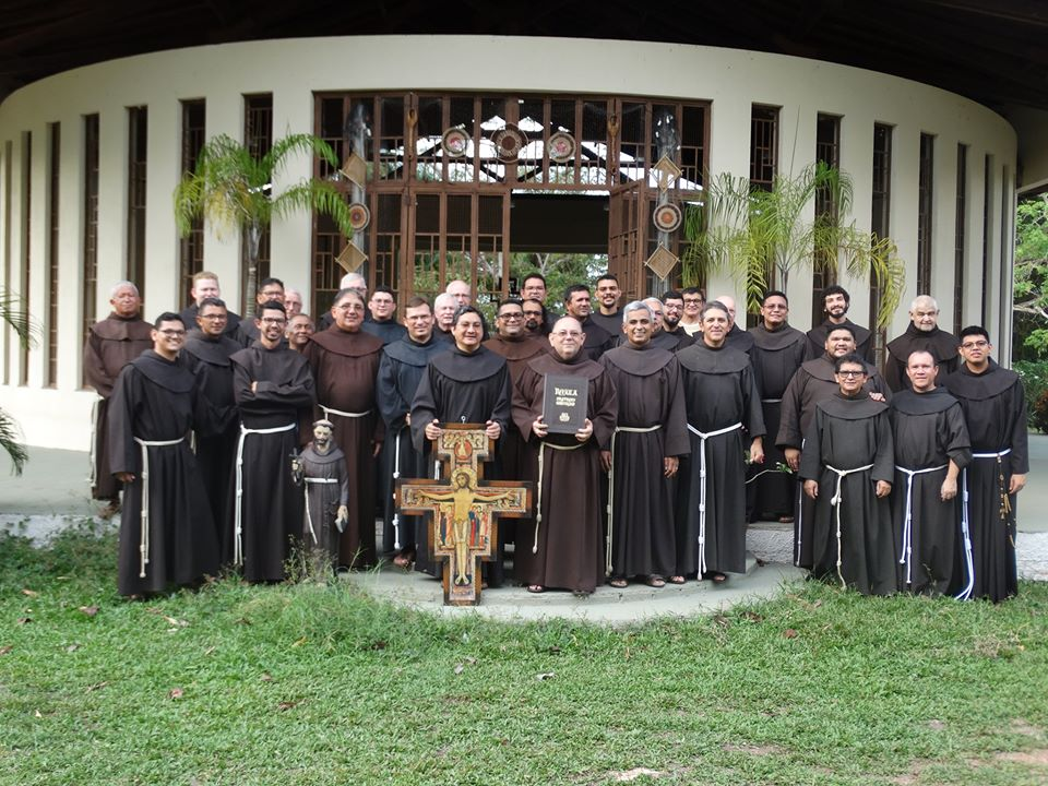 Frades pertencentes a Custódia reunidos no último Capitulo Custodial (2019) no Centro de Formação Emaús, em Santarém, Pará.